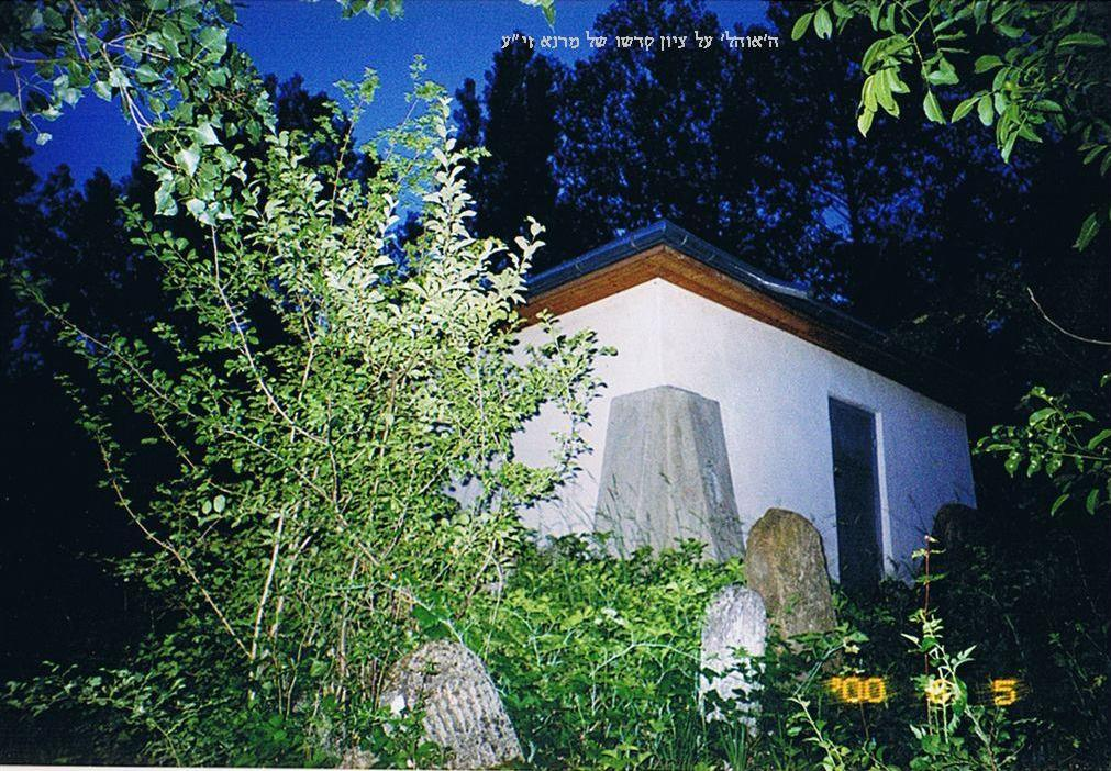 האוהל על ציונם של רבותינו הקדושים מבוטשעטש זי"ע בעיירה בוטשעטש ברומניה